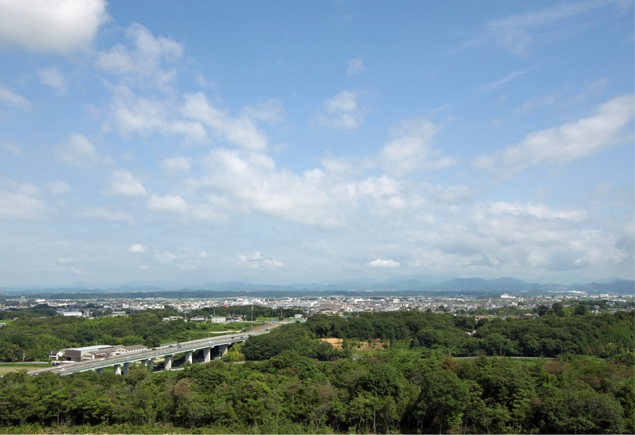 小野市全景